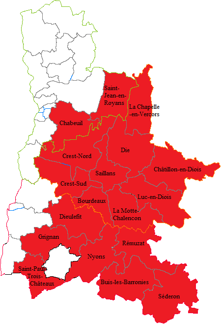 Troisième circonscription législative du département de la Drôme